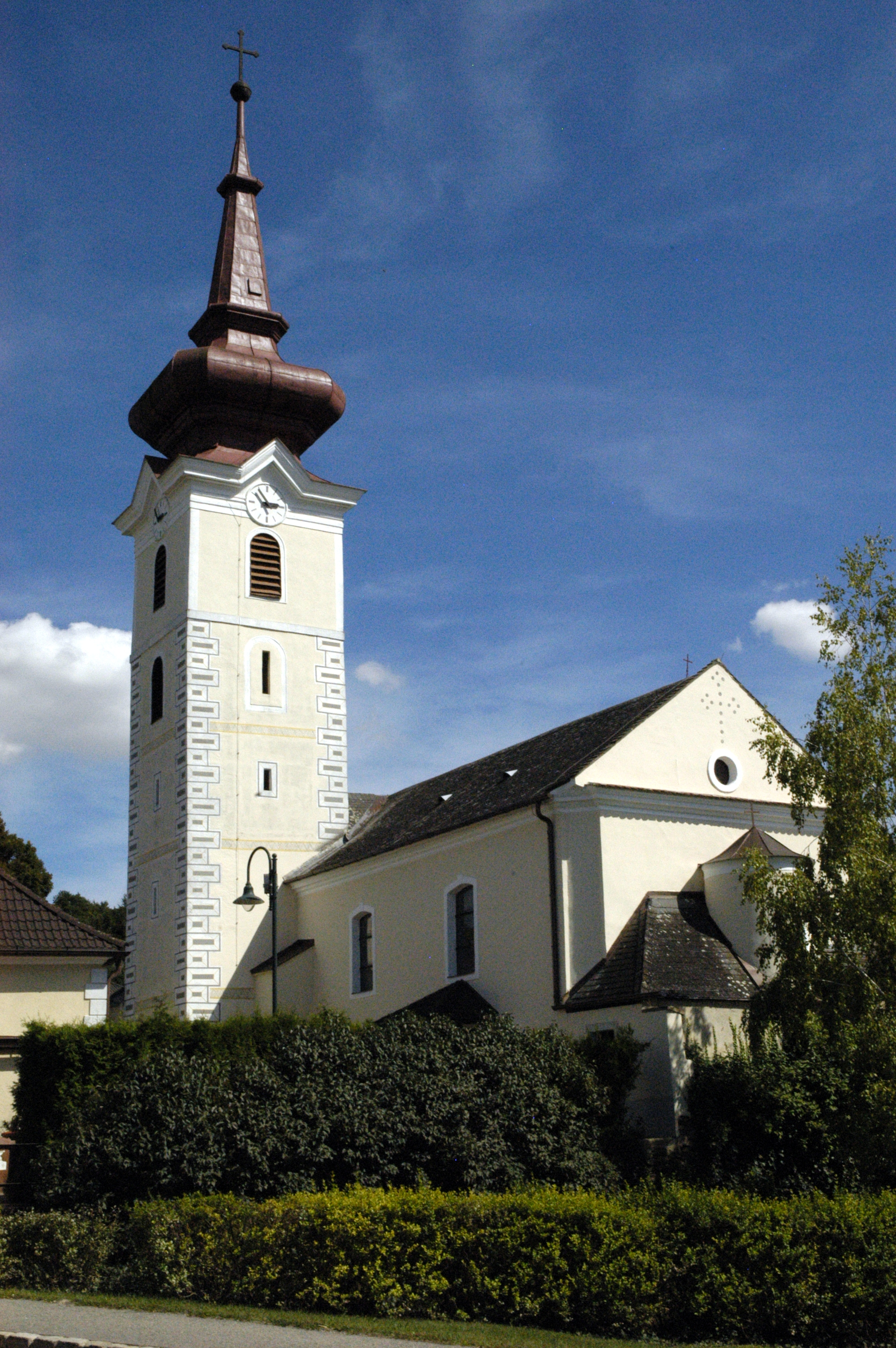 Pfarrkirche heiliger Geist in Fahndorf, Gemeinde Ziersdorf